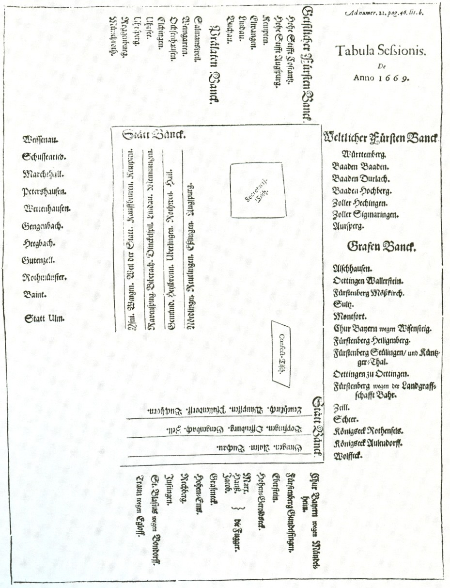 Feierliche Sitzung des Schwäbischen Kreises im Ulmer Rathaussaal Sitzordnung für die Sitzung des Schwäbischen Kreises in Ulm 1669 Druckblatt Ulm, Stadtarchiv, F3, Ansicht 620g